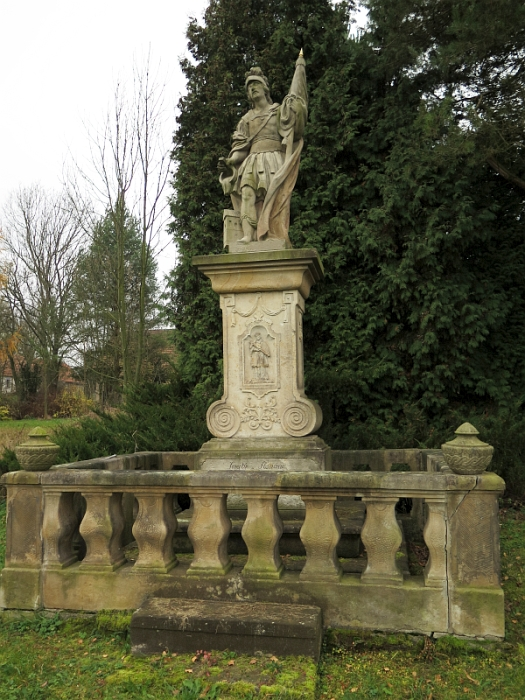 Socha svatého Floriána, cesta ke škole vlevo, před čp. 5, Žitětín.